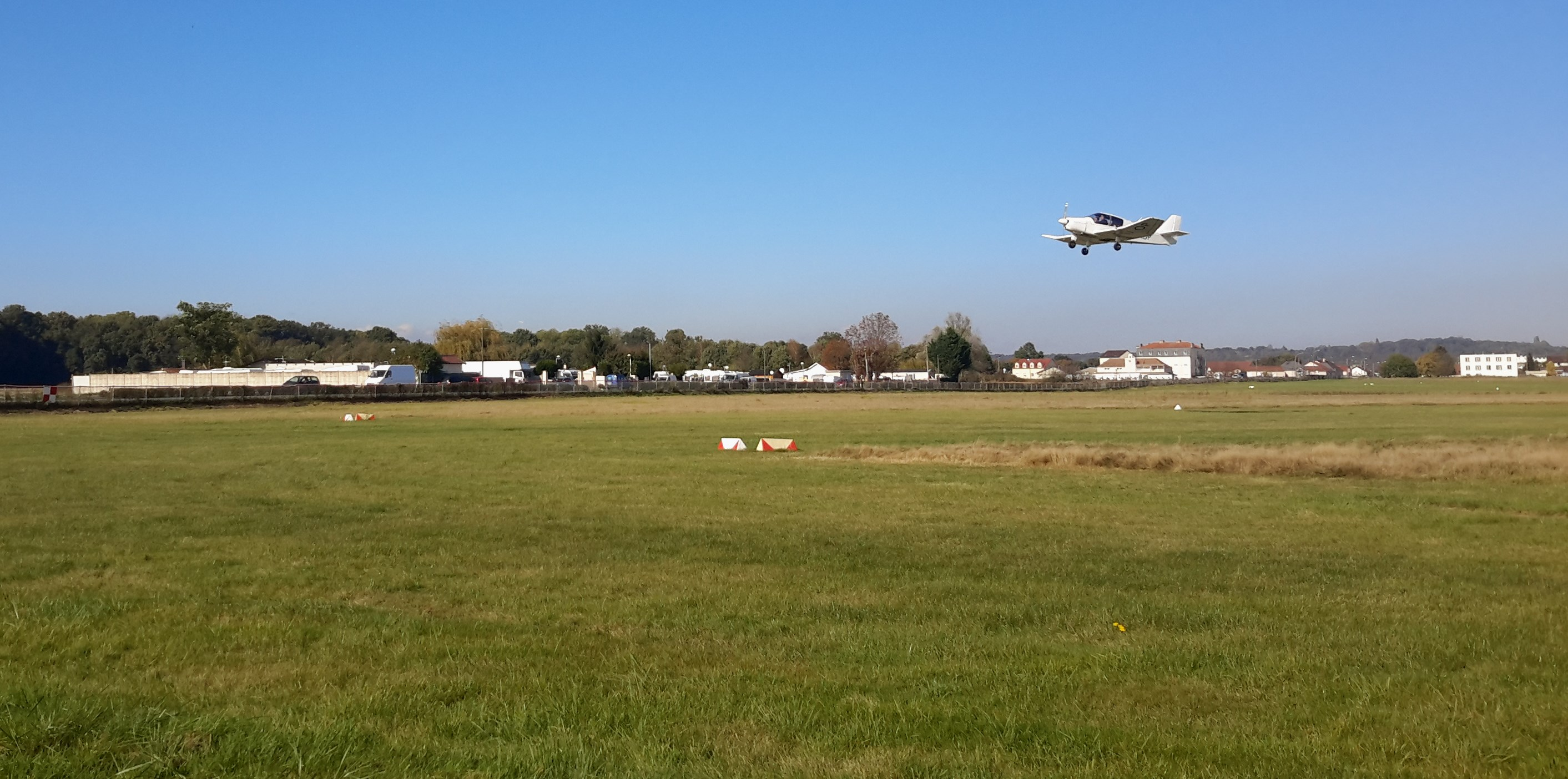 Aérodrome de Chelles - Le Pin, Chelles, Seine et Marne, France. Décollage...